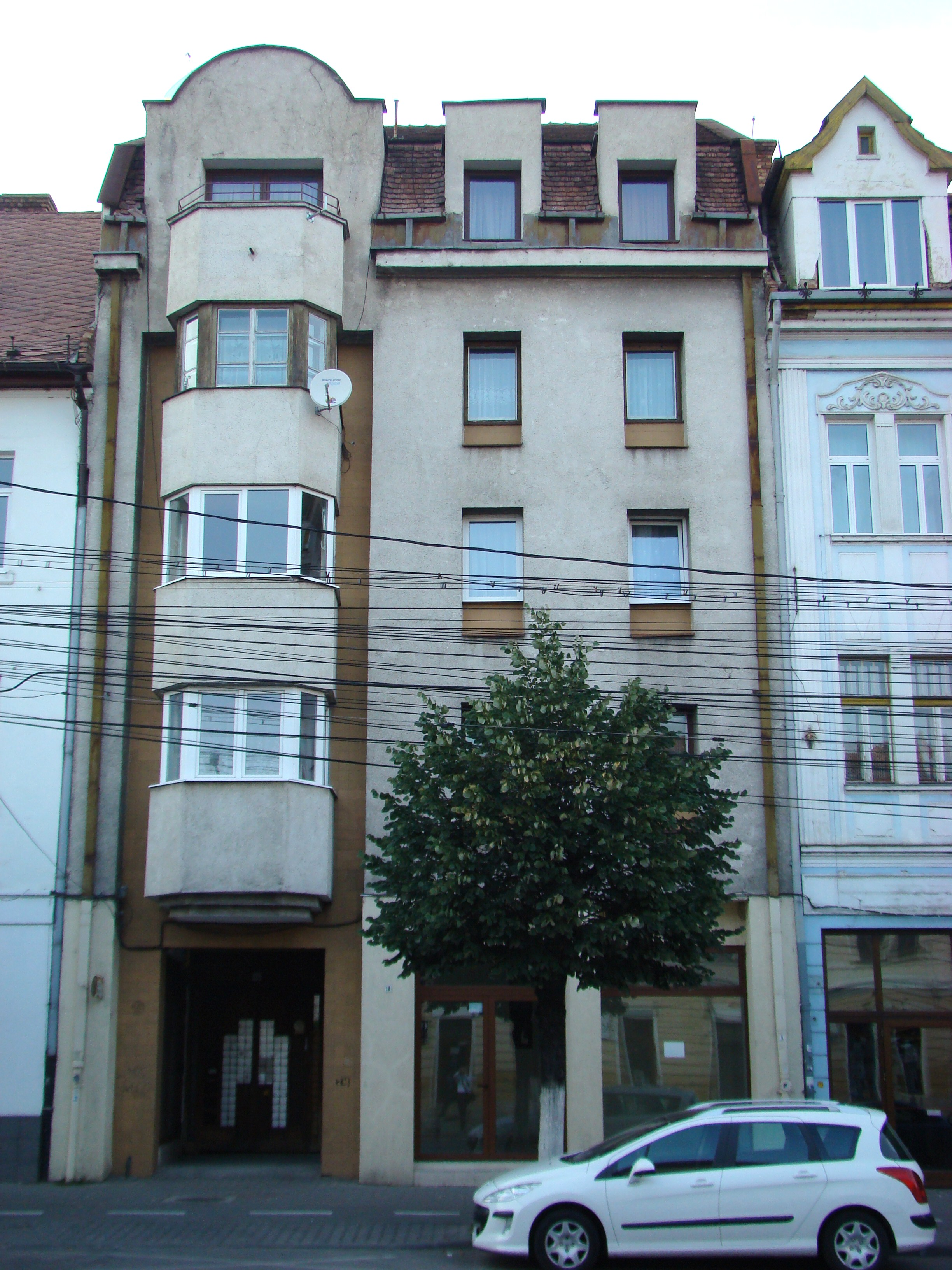 Clădire monument istoric, Bd.21 Decembrie 1989, nr.19